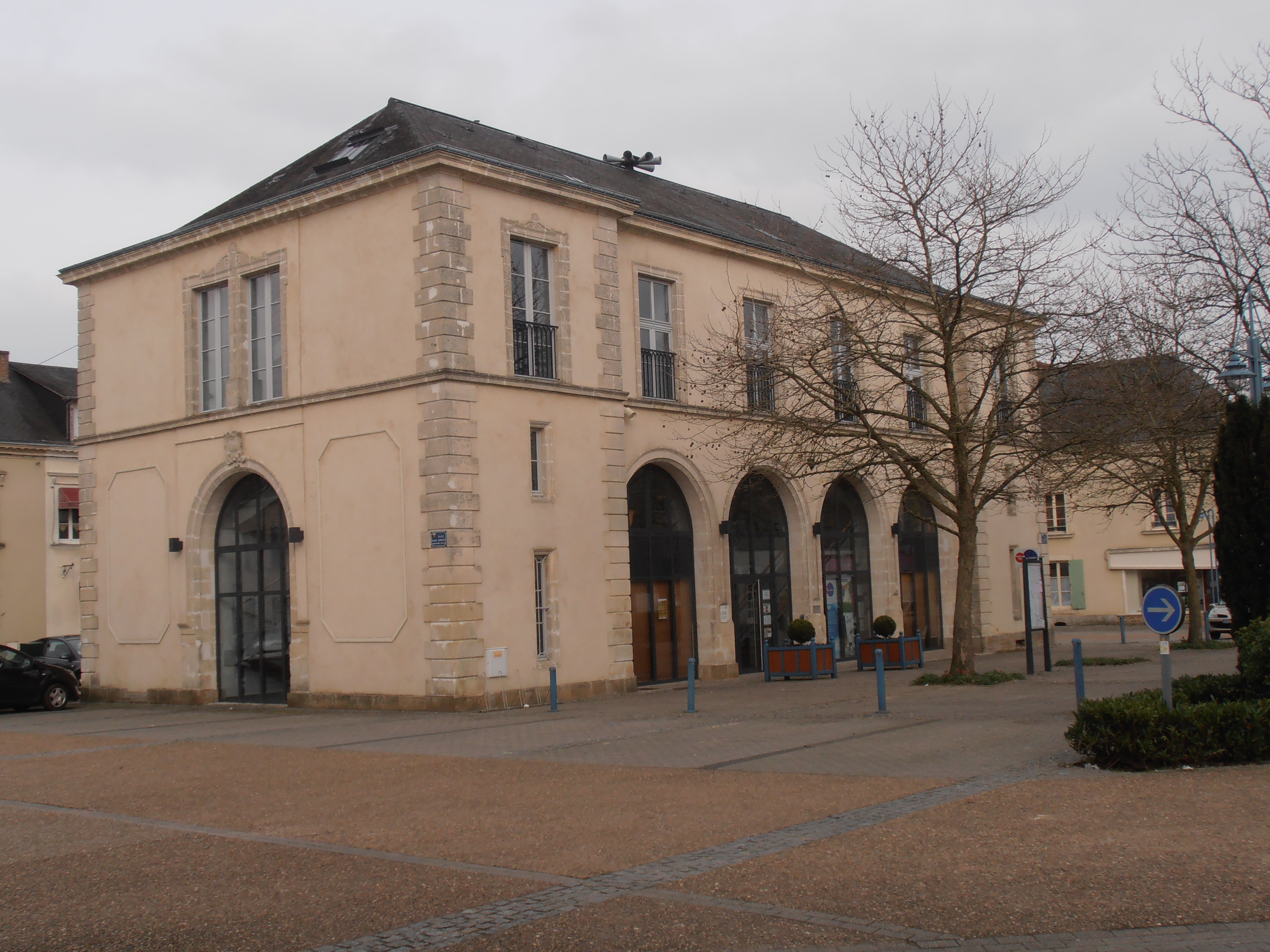 Le bâtiment de la mairie de Brûlon, Sarthe, France